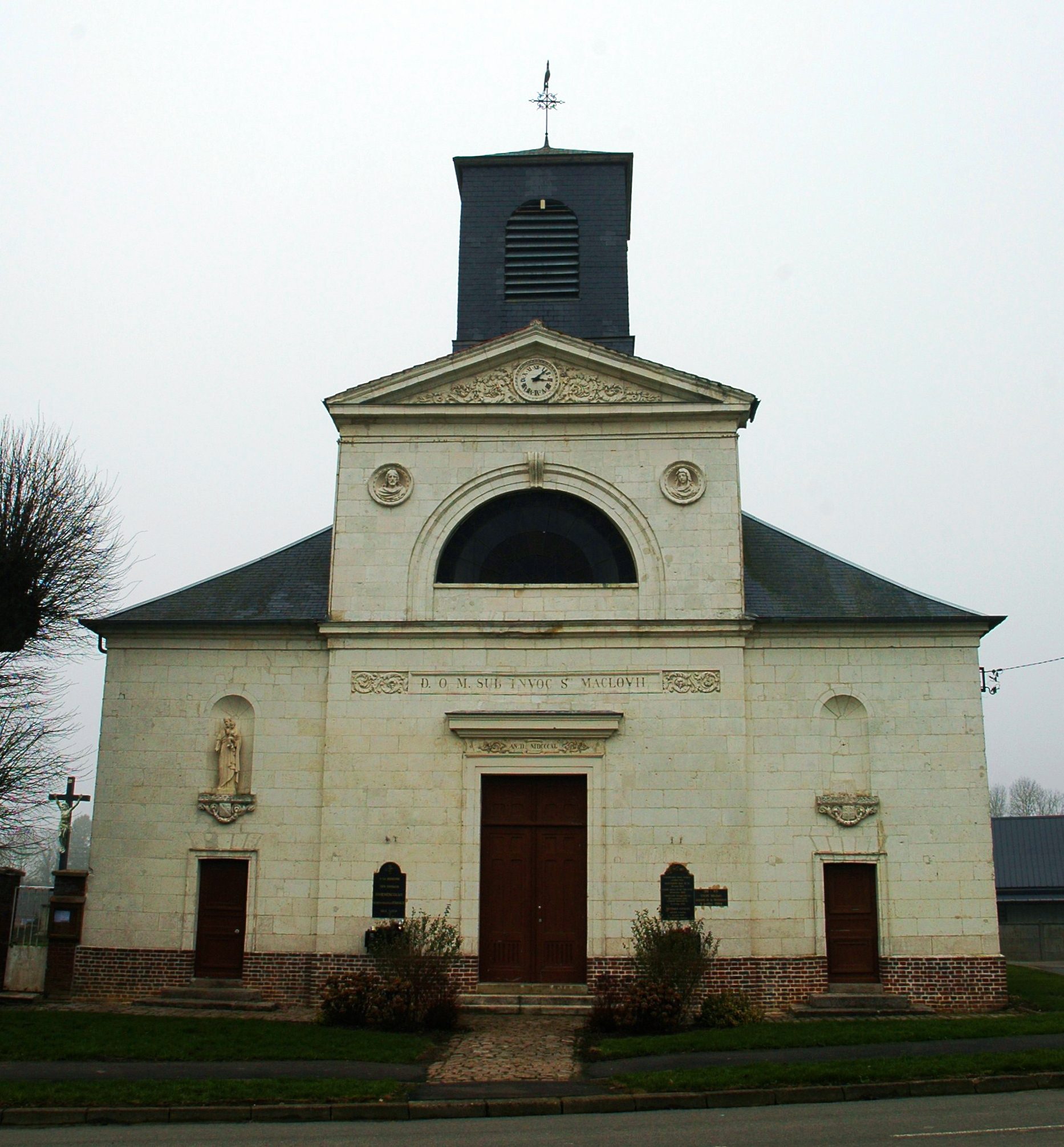 Hénencourt (Somme, France). L'église Saint-Maclou.